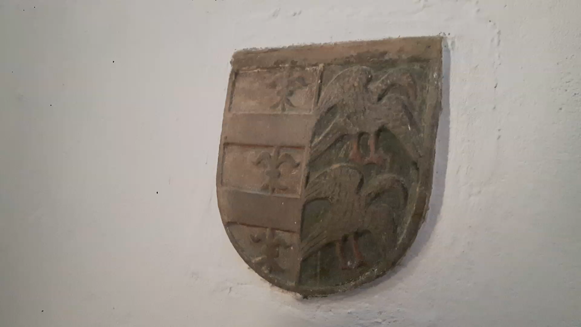 Lauda sepulcral, del apellido Getino, traída por el Padre Getino, así conocido en el pueblo de Genicera